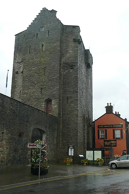 Roscrea Castle